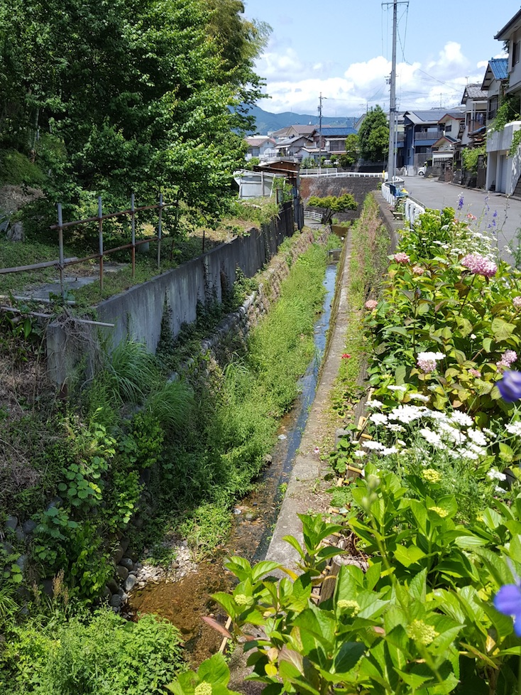 四方沢川上流（清水区馬走）